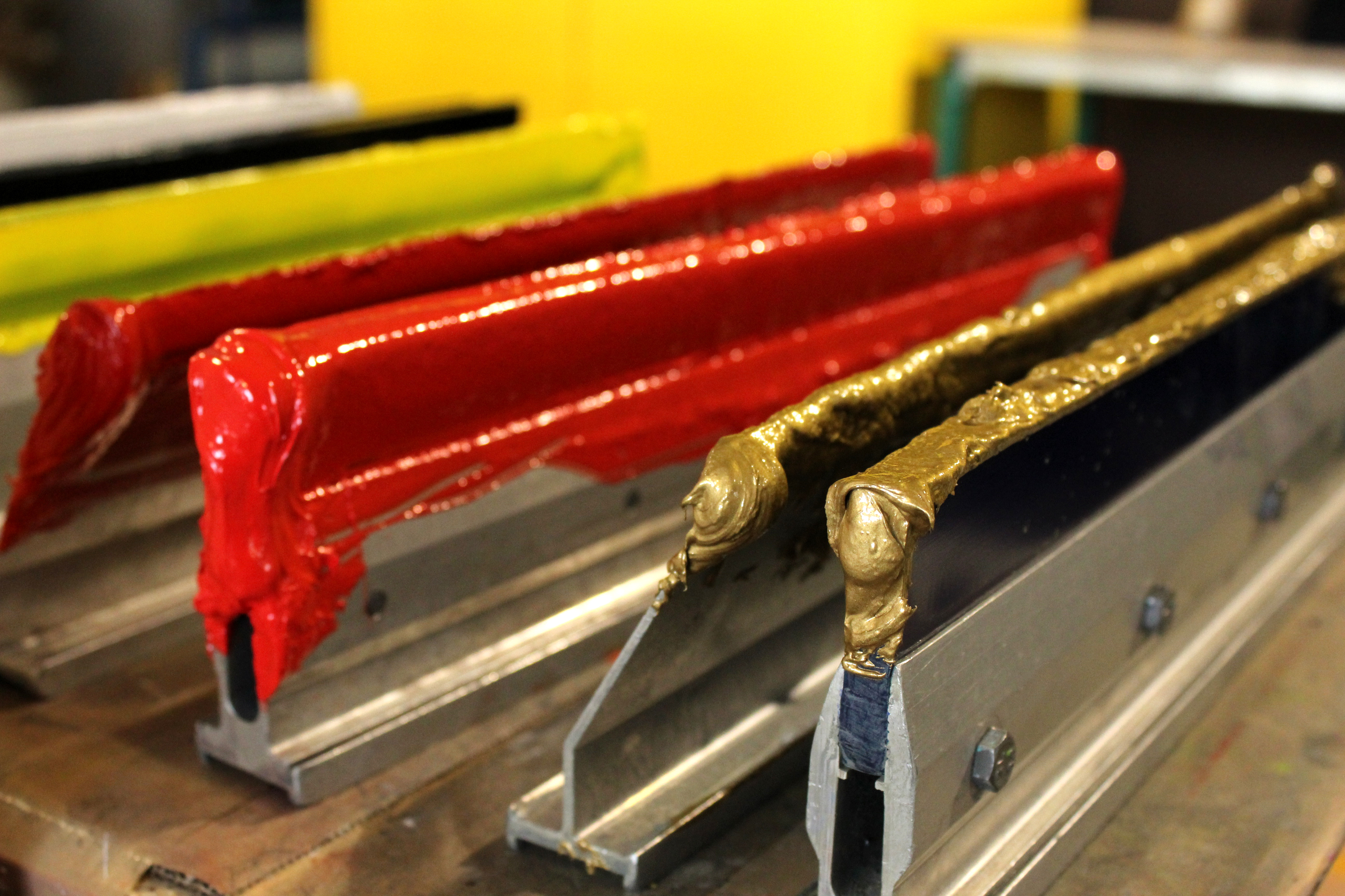 Detalle de las tintas serigrafía. Color rojo y dorado.